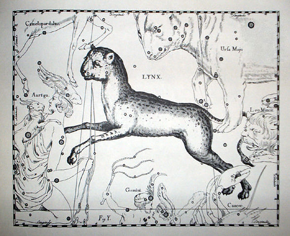 Tavola Y del terzo volume "Firmamentum Sobiescianum, sive uranographia" dell'opera "Prodromus Astronomia" di Johannes Hevelius, pubblicato nel 1690 a Danzica. La tavola riproduce la costellazione "Lynx" dell'Emisfero Boreale.